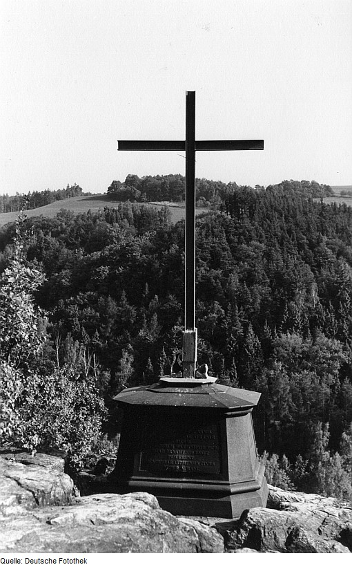 Original image description from the Deutsche FotothekMeißen-Dobritz. Blick vom Götterfelsen